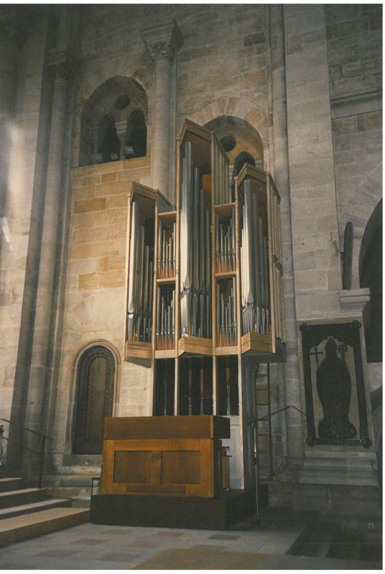 Chororgel der Firma Rieger im Ostchor